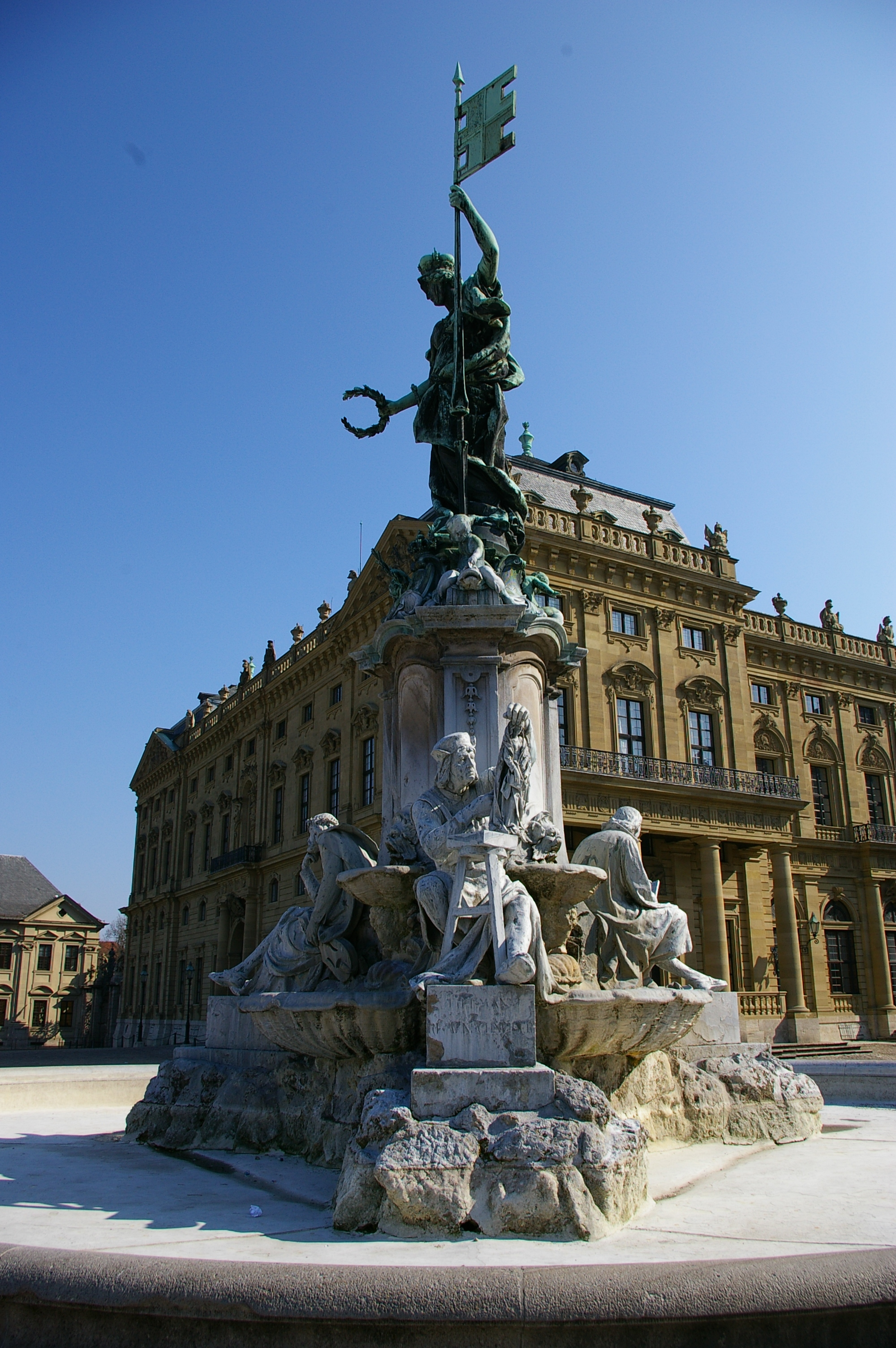 Frankoniabrunnen Würzburg